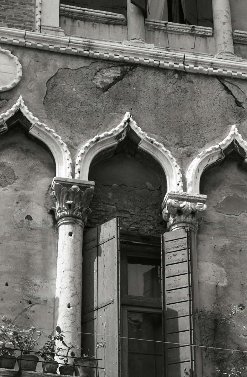 Servizio fotografico : Venezia, 1968 / Paolo Monti. - Strisce: 3, Fotogrammi complessivi: 12 : Negativo b/n, gelatina bromuro d'argento/ pellicola ; 35 mm. - ((I fotogrammi hanno una doppia numerazione. . - Sul portanegativi: Pentax Agfa 21. - Sul dorso del portanegativi Monti specifica: "Piccioni con fregio". - Probabilmente questa specifica in penna biro rossa si riferisce a ricerche personali che esulano dal contesto del servizio commissionato da Electa. - Occasione: Pubblicazione: "Edoardo ARSLAN, Venezia gotica: architettura civile gotica veneziana, Milano, Electa, 1970". - Fonte: Agenda di Paolo Monti: Venezia Architettura Gotica Civile / Ed. Electa maggio/giugno 1968 (1968/05-1968/06), presso Archivio Paolo Monti